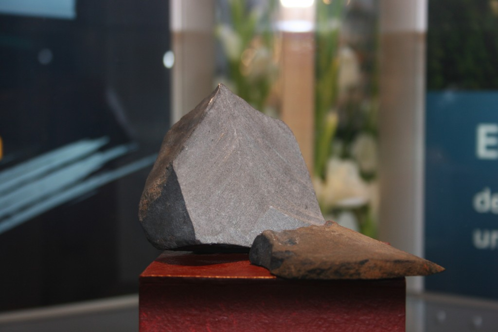 Neuschwanstein_II_Foto